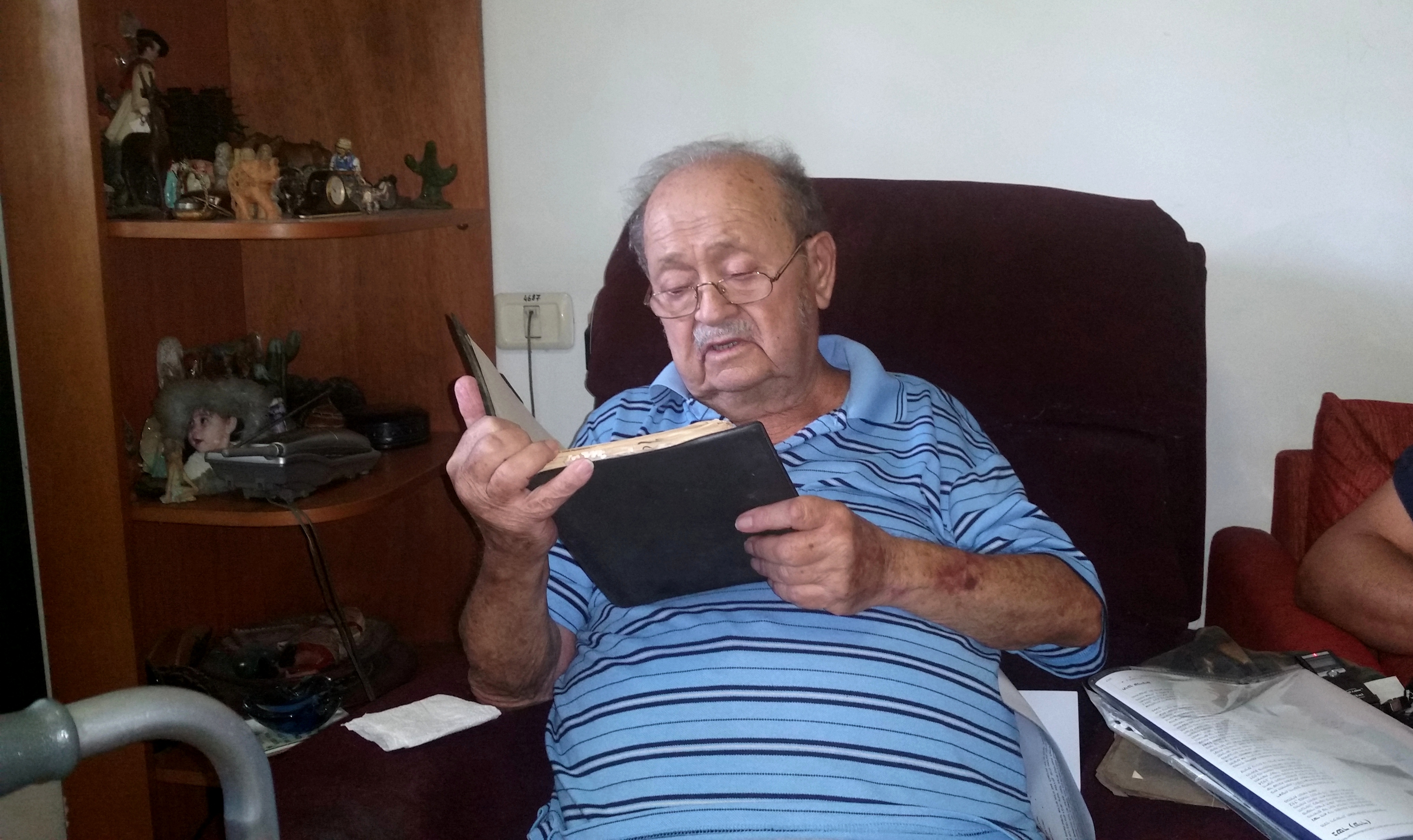 הסופר ישראל לרמן בביתו ברמת אפעל מביא במחברת המחקר שלו שכתב בעת שאסף את החומר לכתיבת הספר " המלט ויצריו" נשר ביובלו שיצא בשנת 1976.